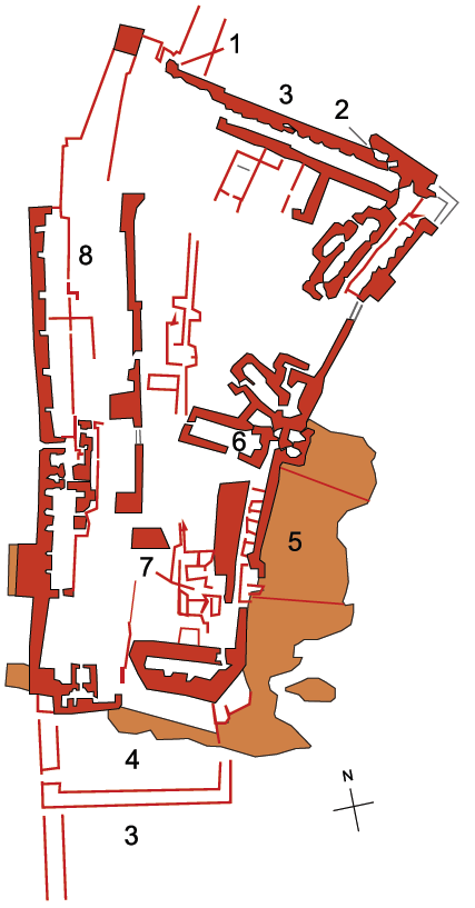 Карта замка в Эль-Караке